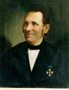 Albert Klotz *6. April 1812-21.April 1894 in Halle/Saale Taubstummenlehrer in Halle /Saale.